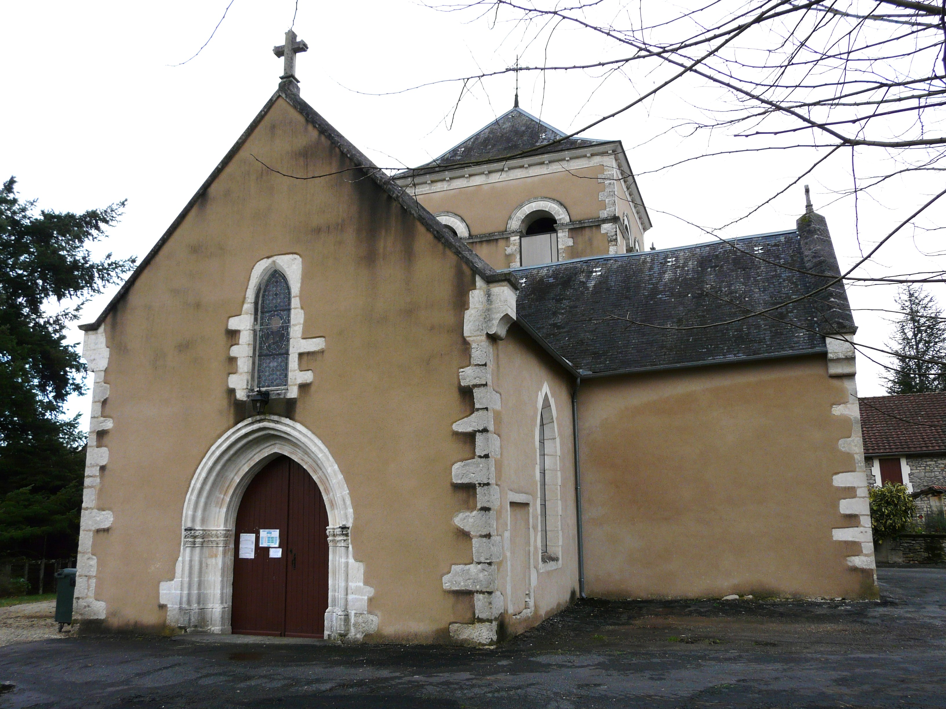 La façade ouest de l'église Saint-Martin, La Boissière-d'Ans, Dordogne, France